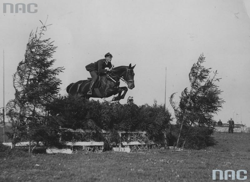 Zawody konne na święcie pułku. Porucznik Jan Mickunas bierze przeszkodę